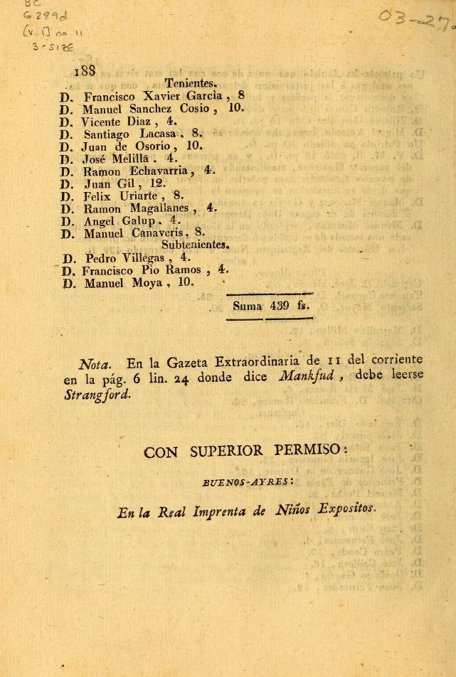 donativos del 4 regimiento, publicados por la Gazeta de Buenos Aires, el 16 de agosto de 1810.